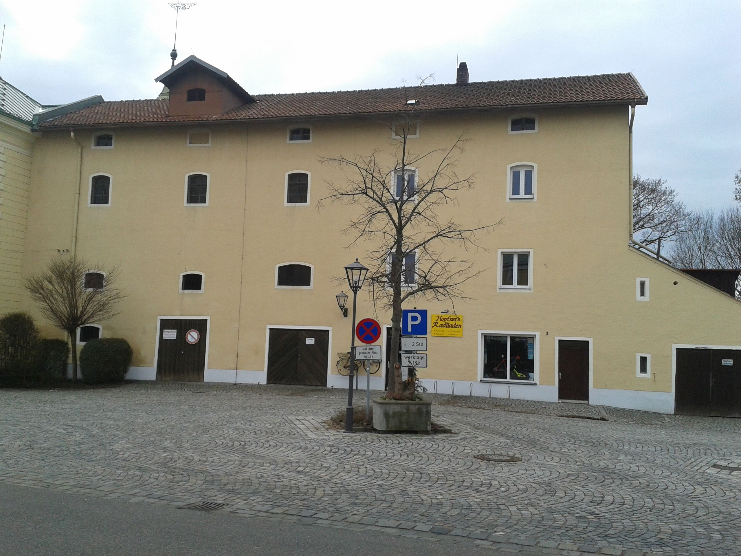 Schoss Leonberg (Leonberg)